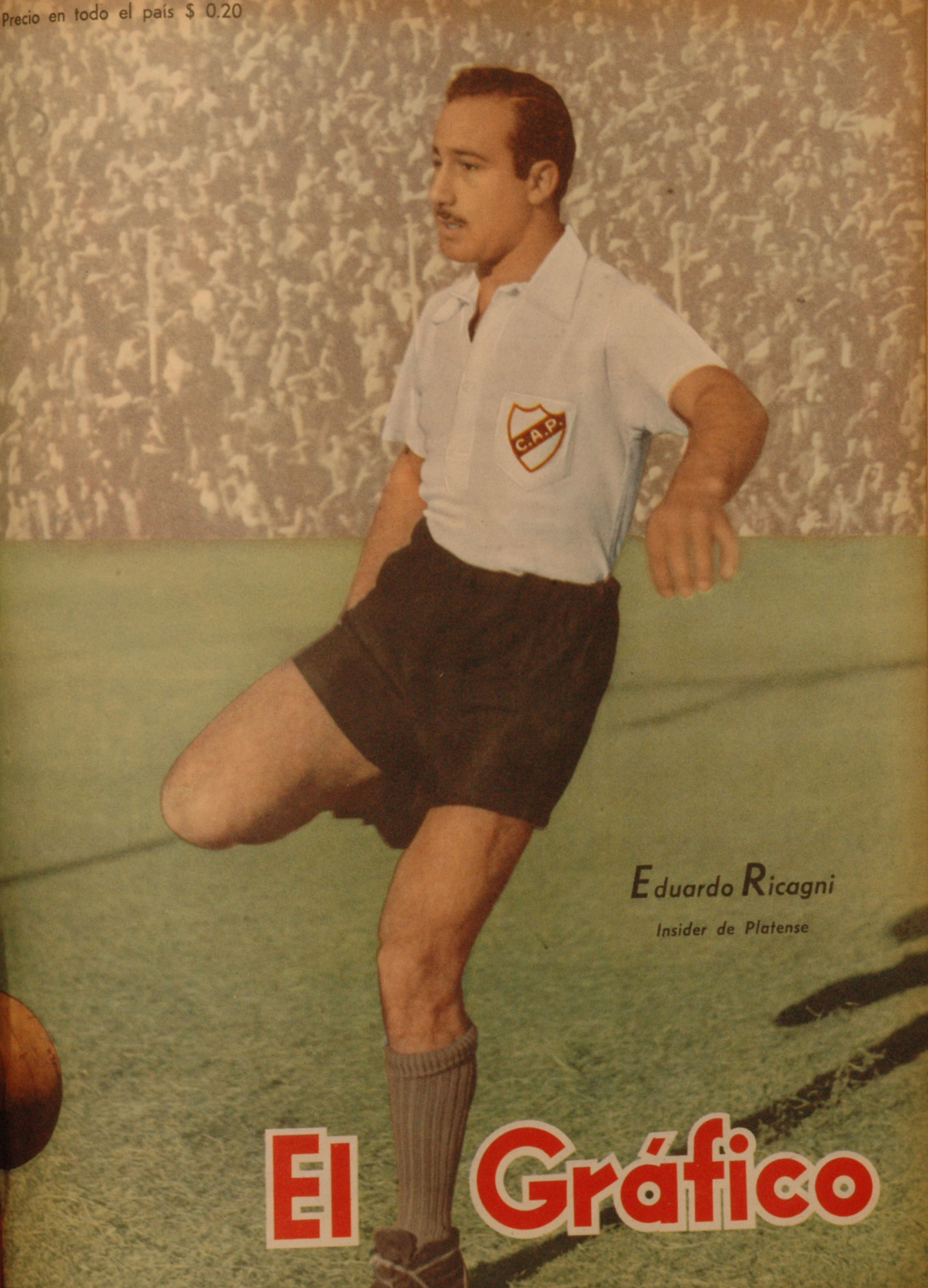 El Grafico del 19 de Julio de 1946. Edicion 1410